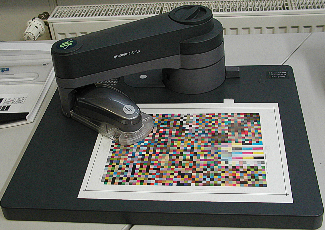 Ein Eye-One iO der Firma X-Rite (vormals GretagMacbeth)